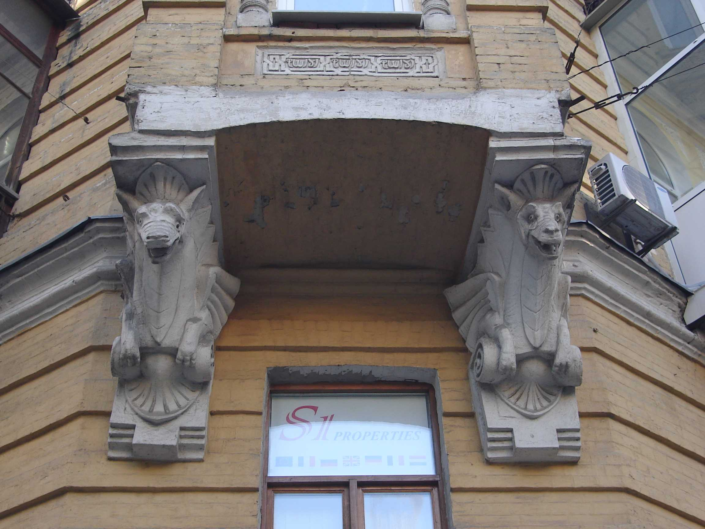 Бывший дом Фурмана по ул.Рейтарской в Киеве